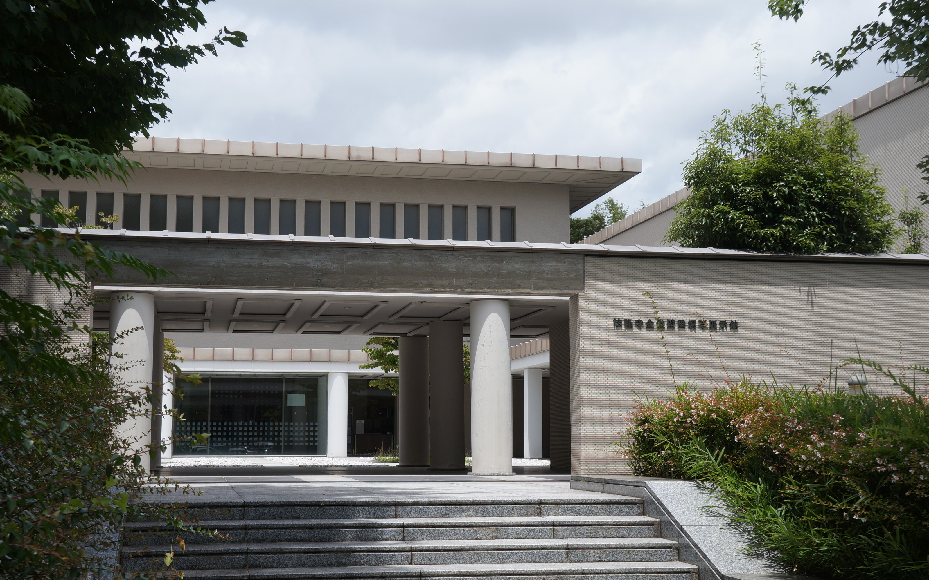 愛知県立芸術大学（長久手市）にある法隆寺金堂壁画模写展示館